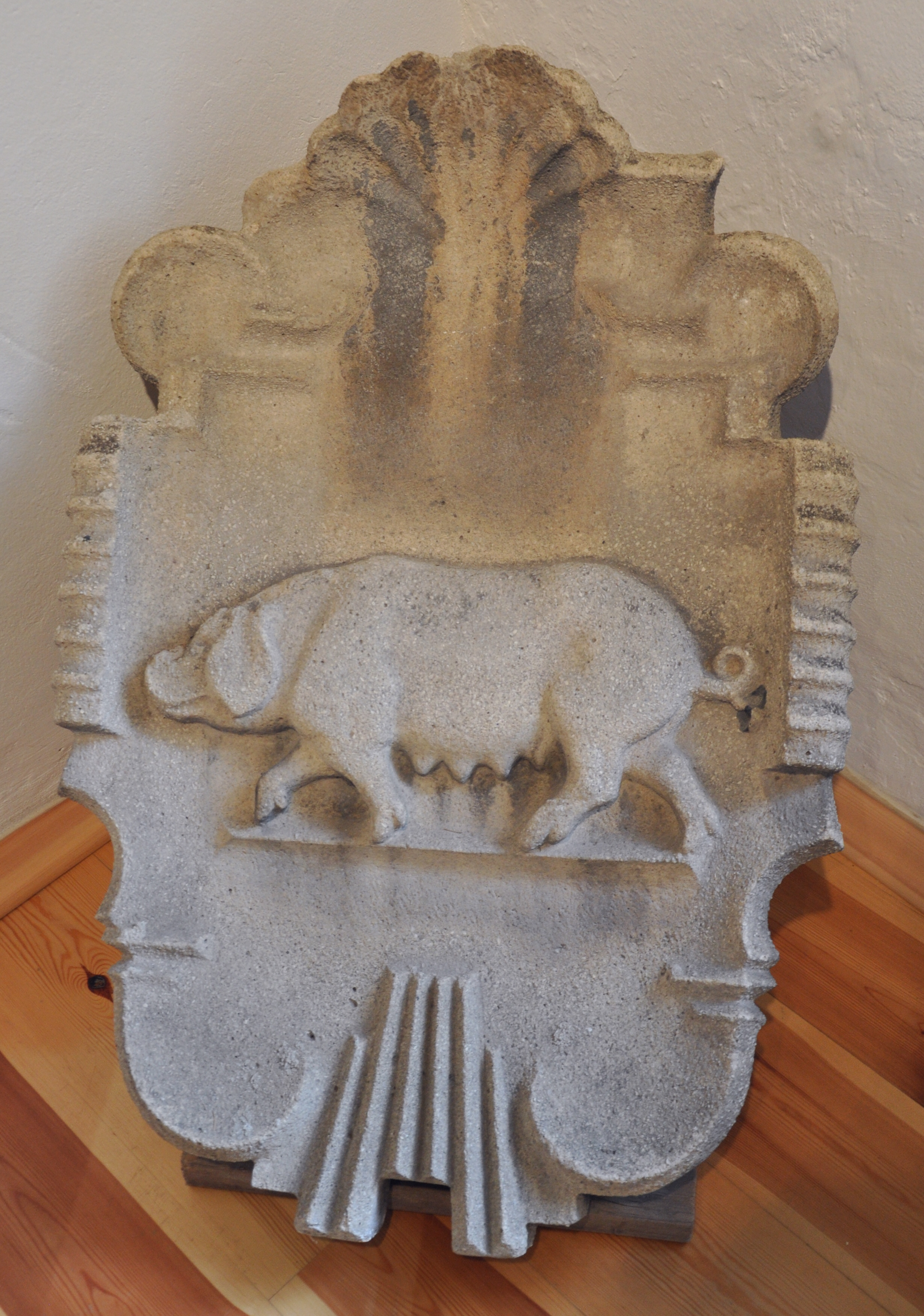 Museum Senftenberg (im Schloss Senftenberg) Wappen der 1971 durch Tagebau untergegangenen Gemeinde Sauo (vom Gemeindeamt)